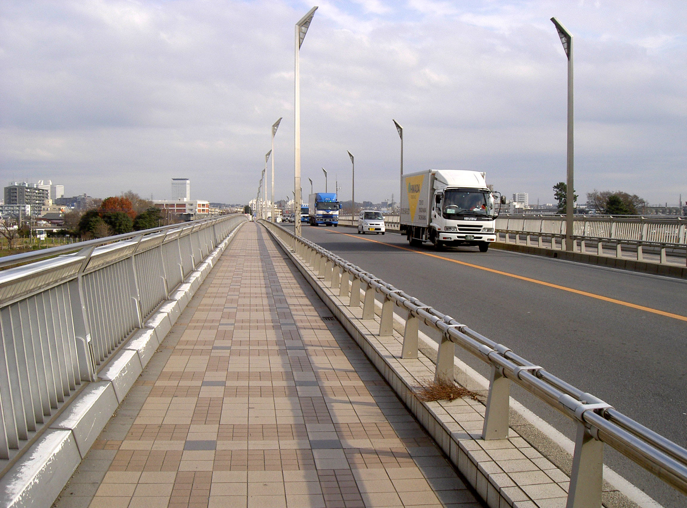 Sagami Ohashi Bridge ja: 相模大橋